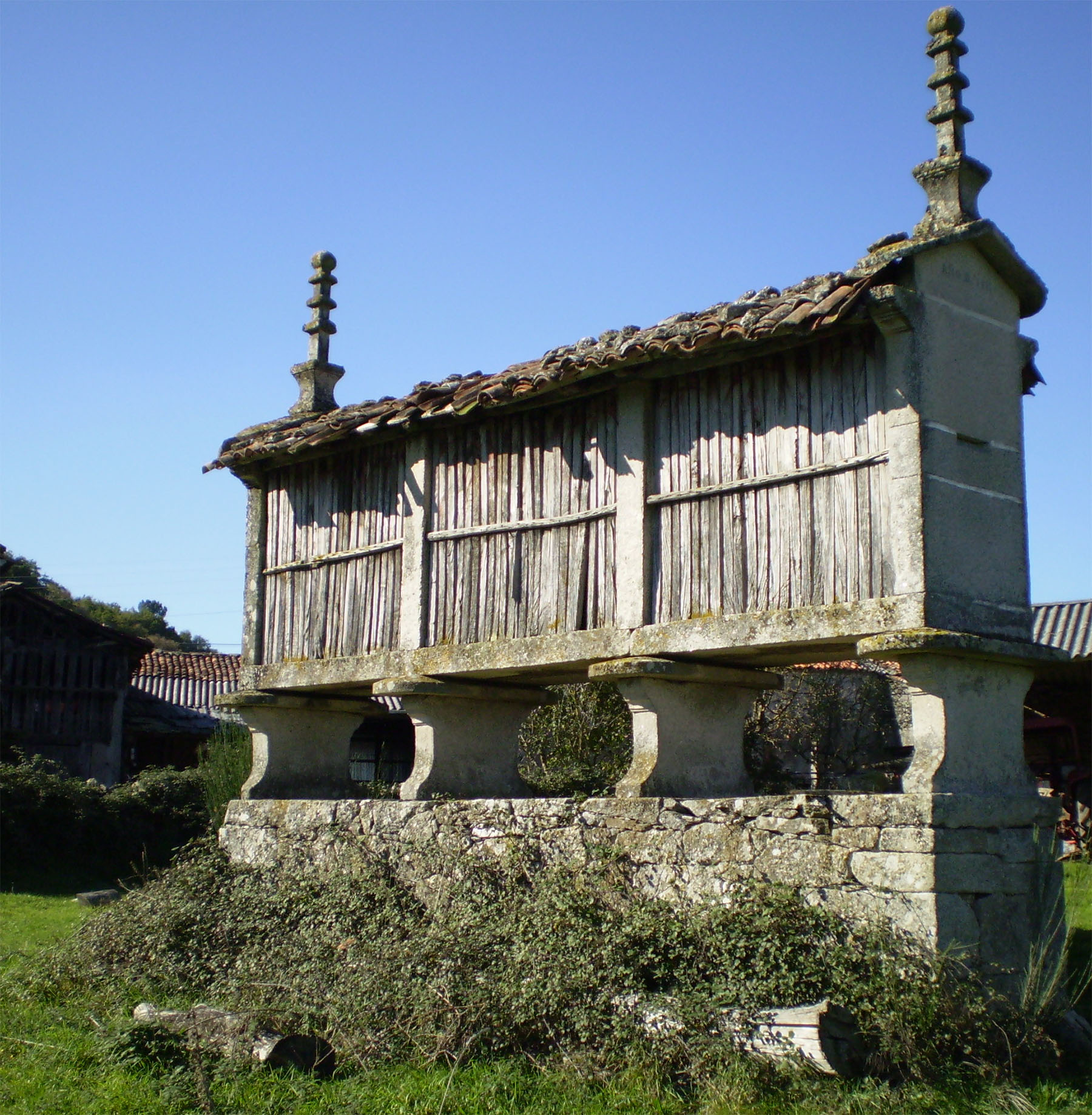 Hórreo tipo mahía, de tres claros sobre soleira de mampostería con elevación sobre catro cepas. Coroado con dous lampeóns fusiformes.